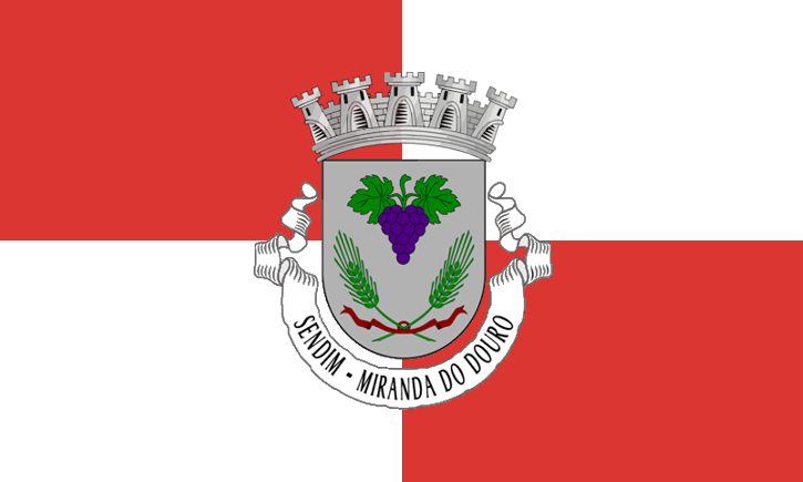 Bandera de la freguesia de Sendim